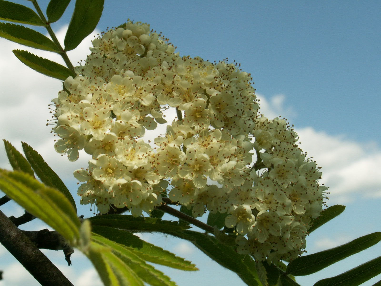 Inflorescensce of Sorbus aucuparia. Buk near Szczecin, NW Poland